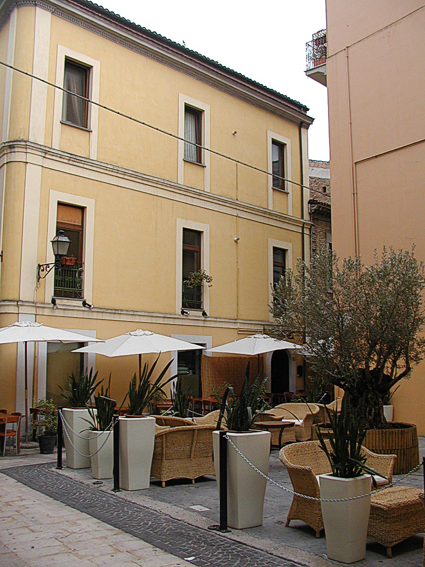 Pescara Centro Storico